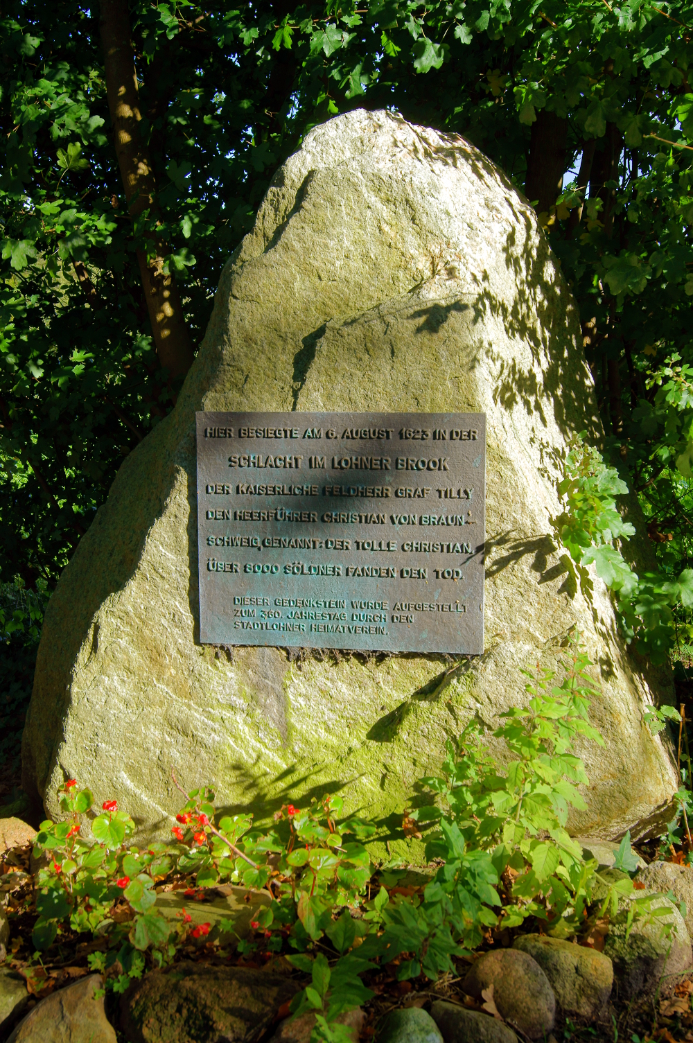 Der Gedenkstein am Düwing Dyk zwischen Stadtlohn und Wüllen (Ahaus) erinnert an die Schlacht bei Stadtlohn, bei der sich am 6. August 1623 die HeereGraf Tillys (Katholische Liga) und Christians von Braunschweig (protestantische Seite) gegenüberstanden. Bei der Schlacht auf dem Blutfeld genannten Areal im Lohner Bruch kamen über 8000 Soldaten ums Leben. Christian erlitt eine schwere Niederlage, konnte sich jedoch mit rund 5000 Mann, einem Drittel seiner ursprünglichen Streitmacht, in die Niederlande retten. Der Stein wurde anlässlich des 360. Jahrestages der Schlacht durch den Heimatverein Stadtlohn errichtet.